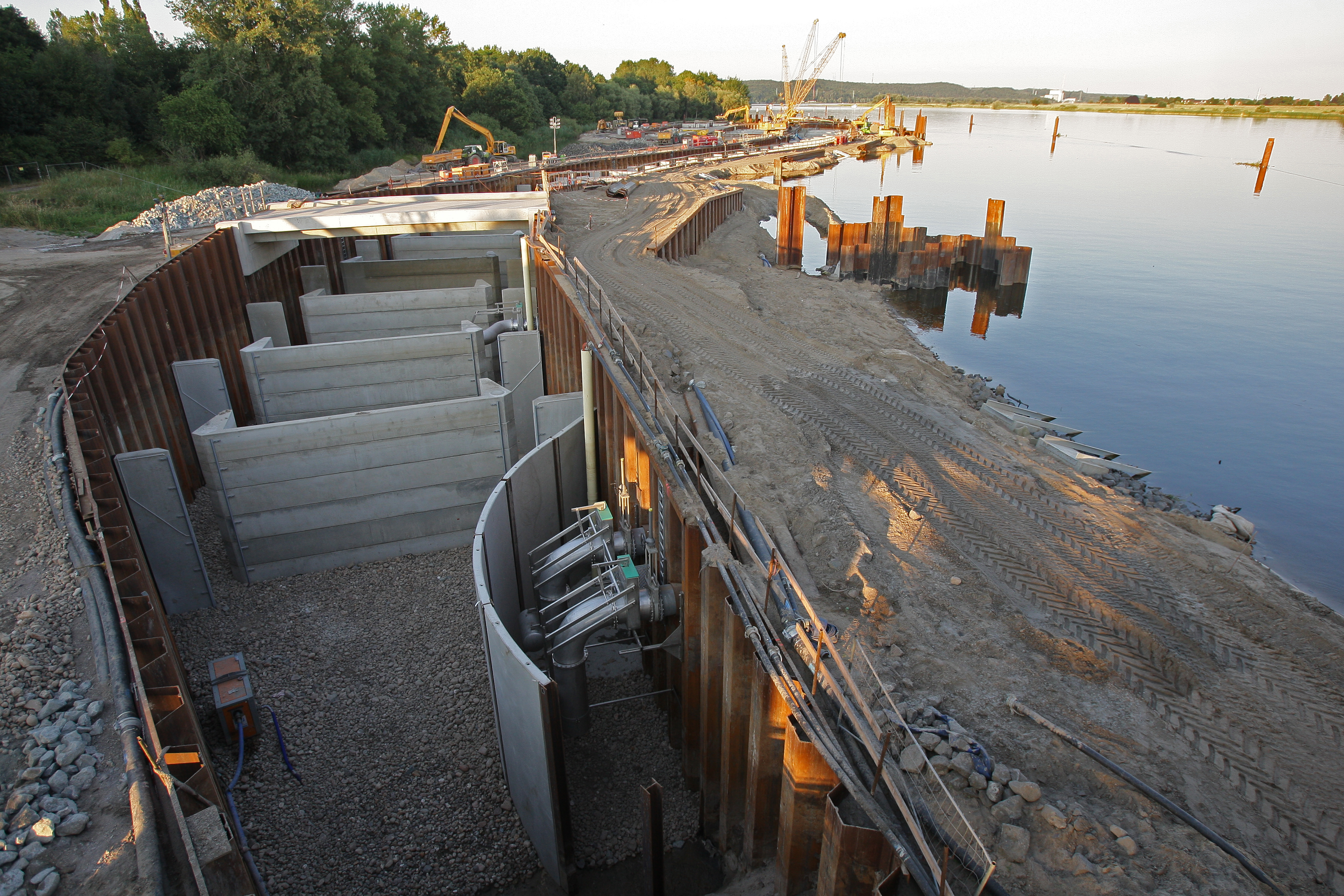 Bau der größten Fischtreppe Europas in Geesthacht. An dieser Stelle der Elbe ist der Aufstieg von Wanderfischen wie Lachs und Meerforelle in den Oberlauf der Elbe nur eingeschränkt möglich. Ab Sommer 2010 soll die neue Fischaufstiegsanlage (Schlitzpass) am Nordufer der Elbe Wanderfischen ermöglichen, ohne Barrieren elbaufwärts zu ihren Laichgebieten zu ziehen.